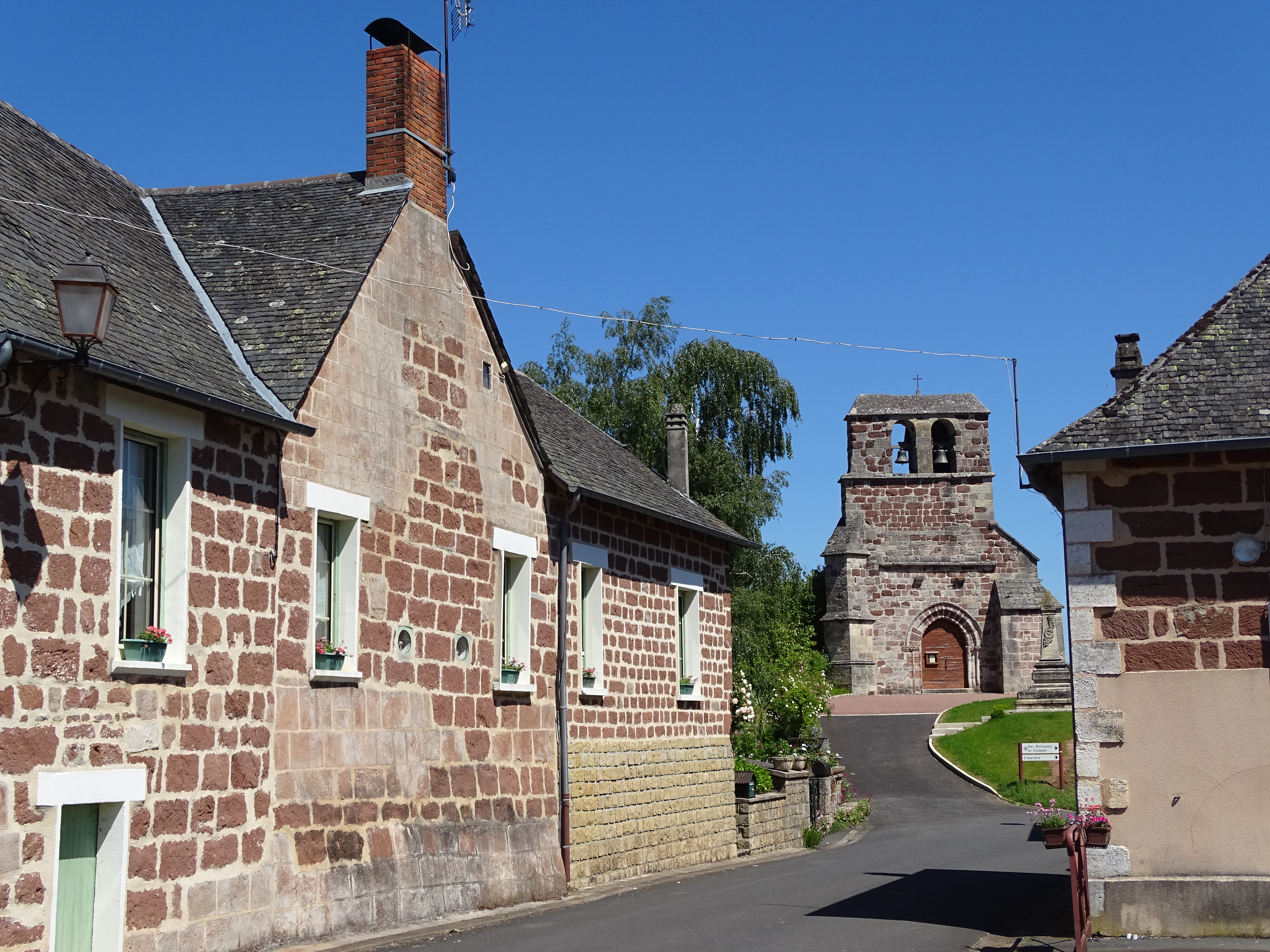 Saint-Cyprien (Corrèze)